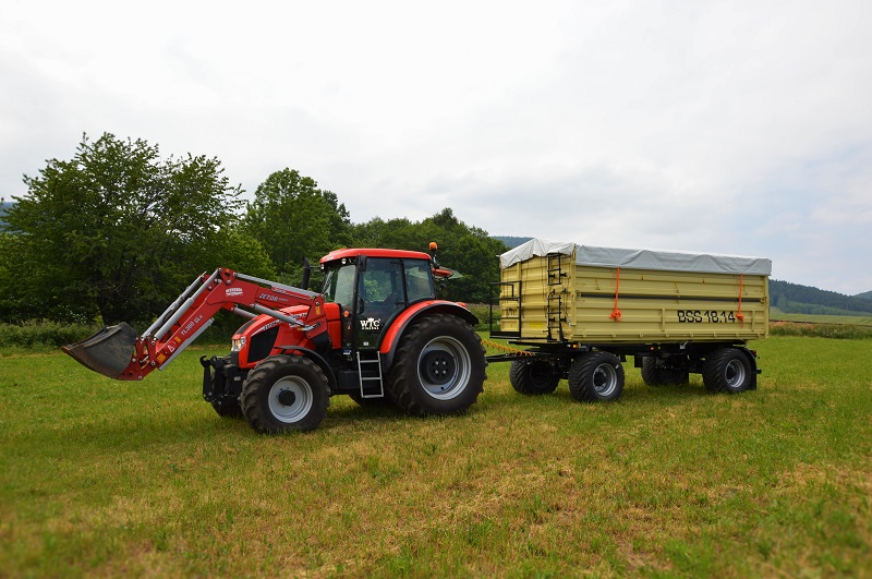 Traktorové přívěsy BSS